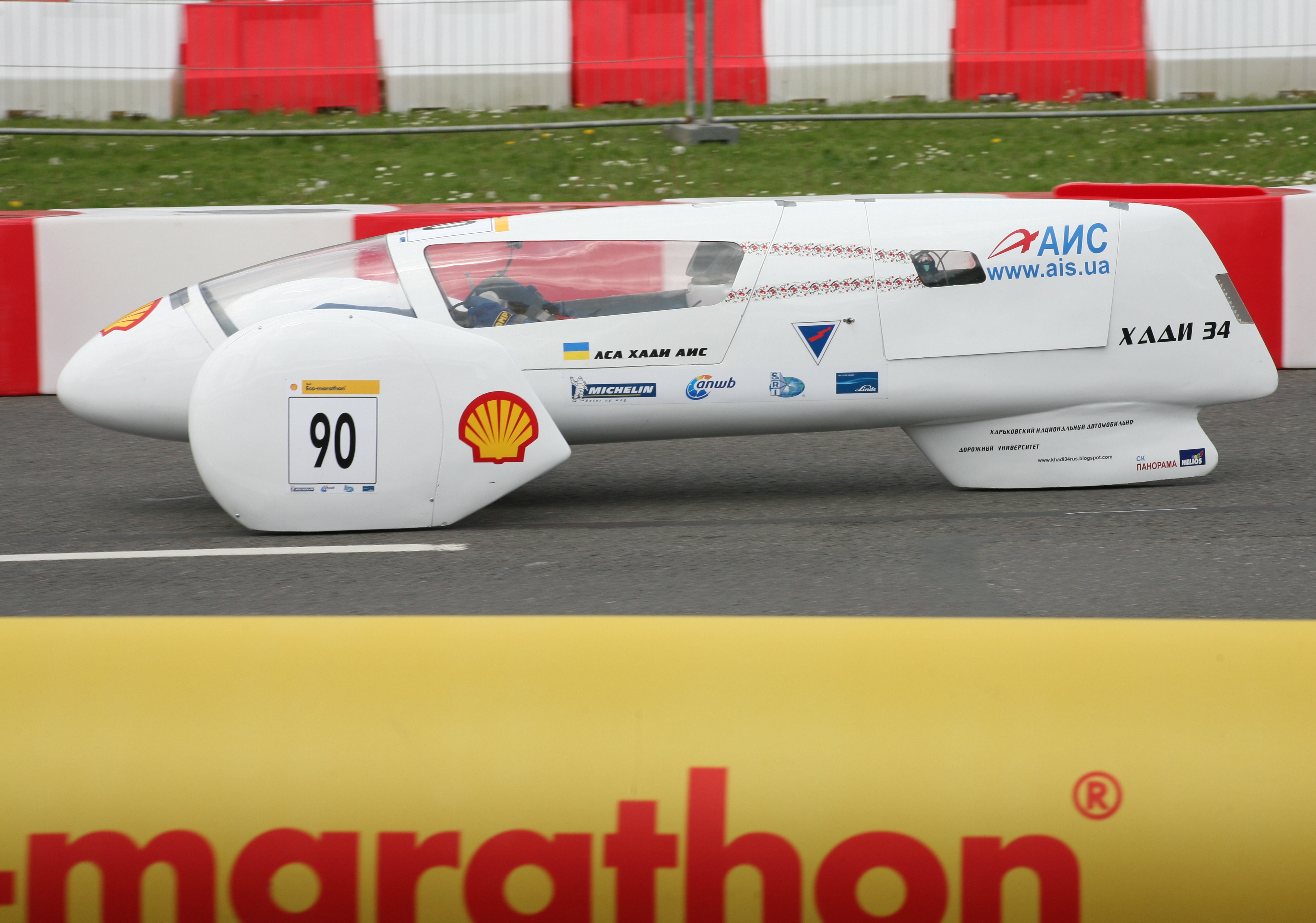 Автомобиль ХАДИ 34 команды "ЛСА ХАДИ АИС" на соревнования Shell eco-marathon 2013 в Роттердаме.